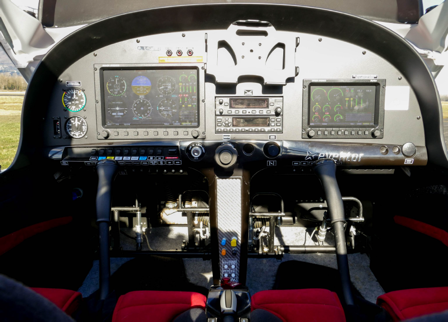 Double commande, radio, transpondeur, anémomètre, altimètre, écrans multi-fonctions.